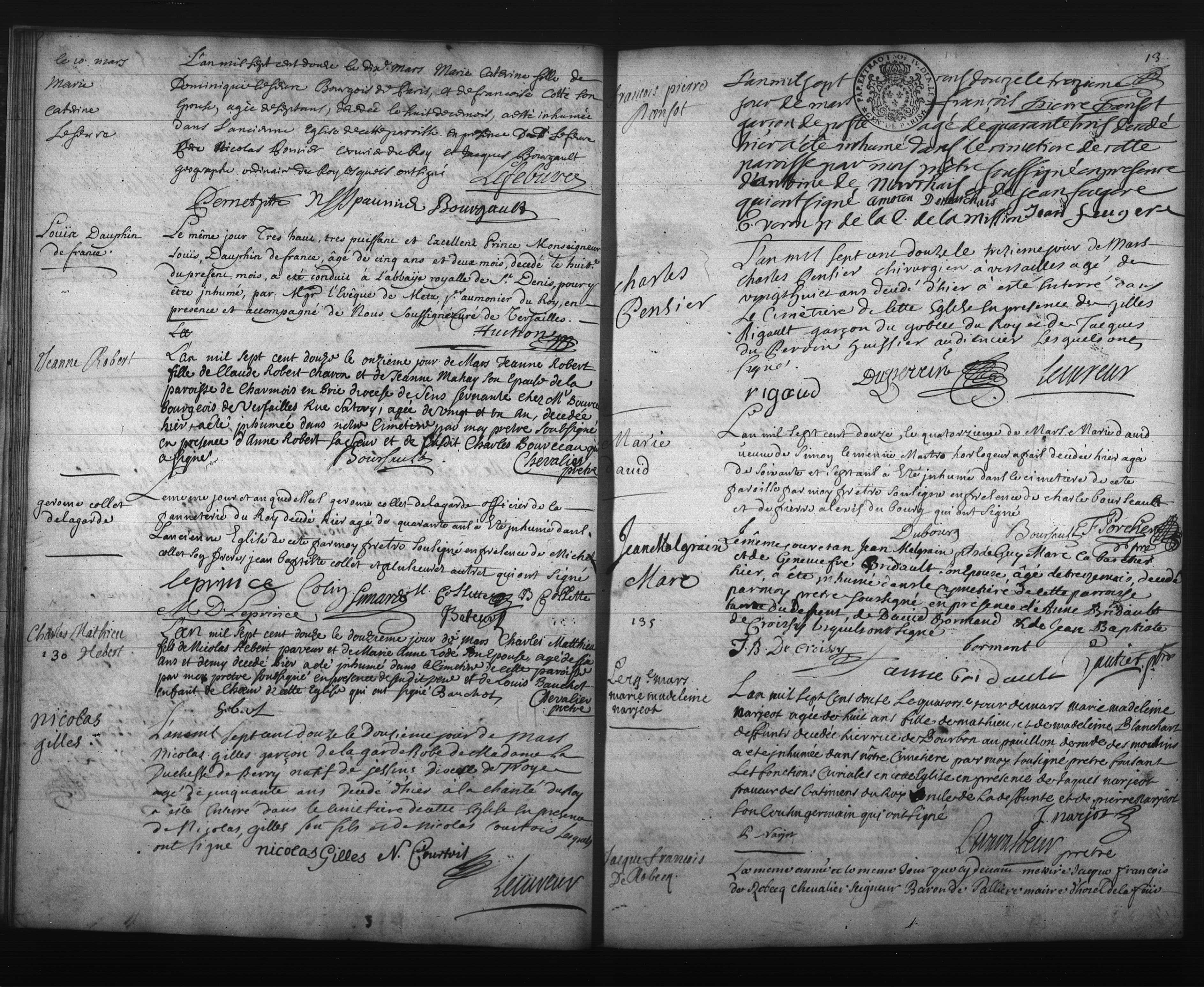 Archives Yvelines